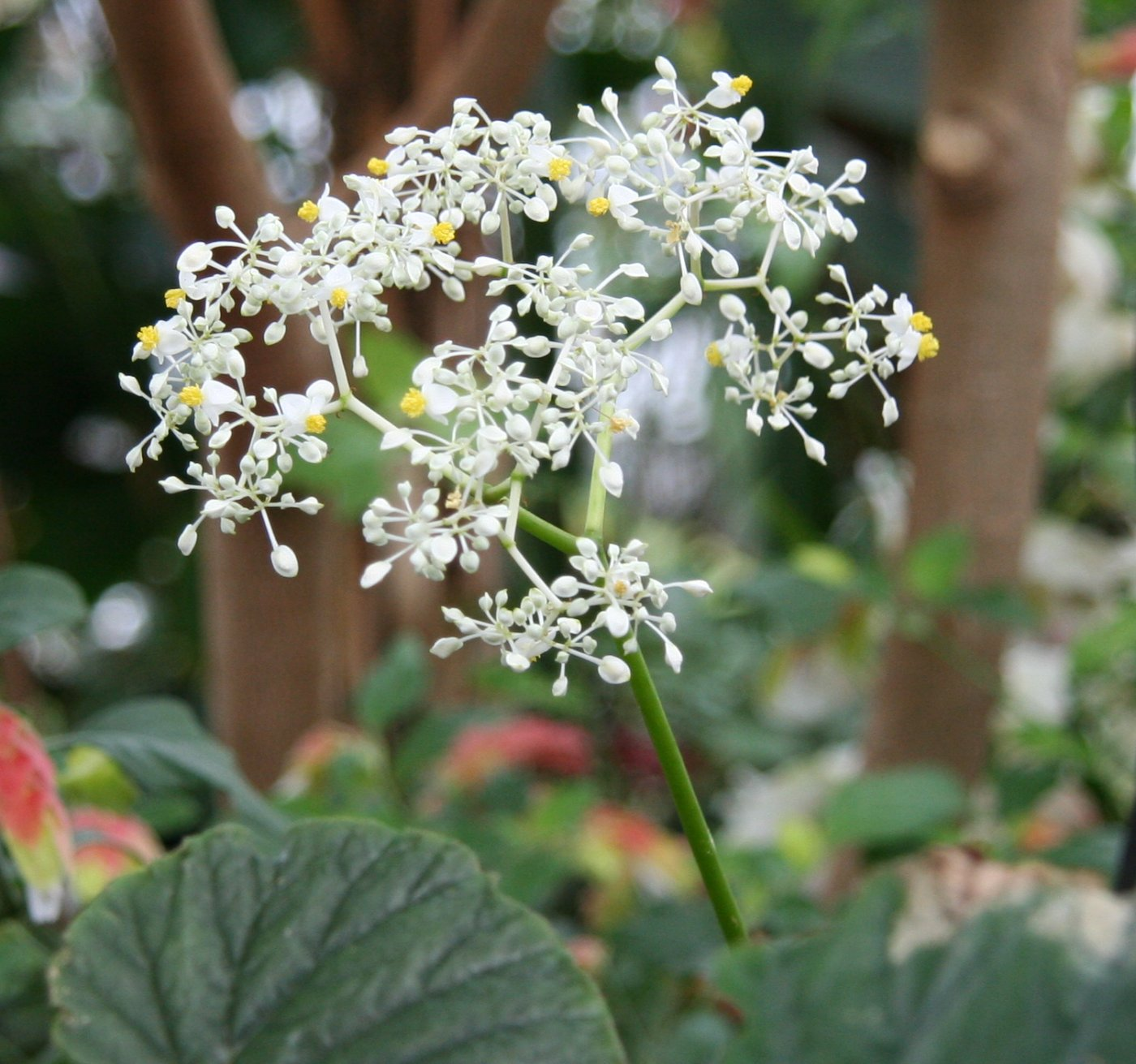 Begonia valida Flower